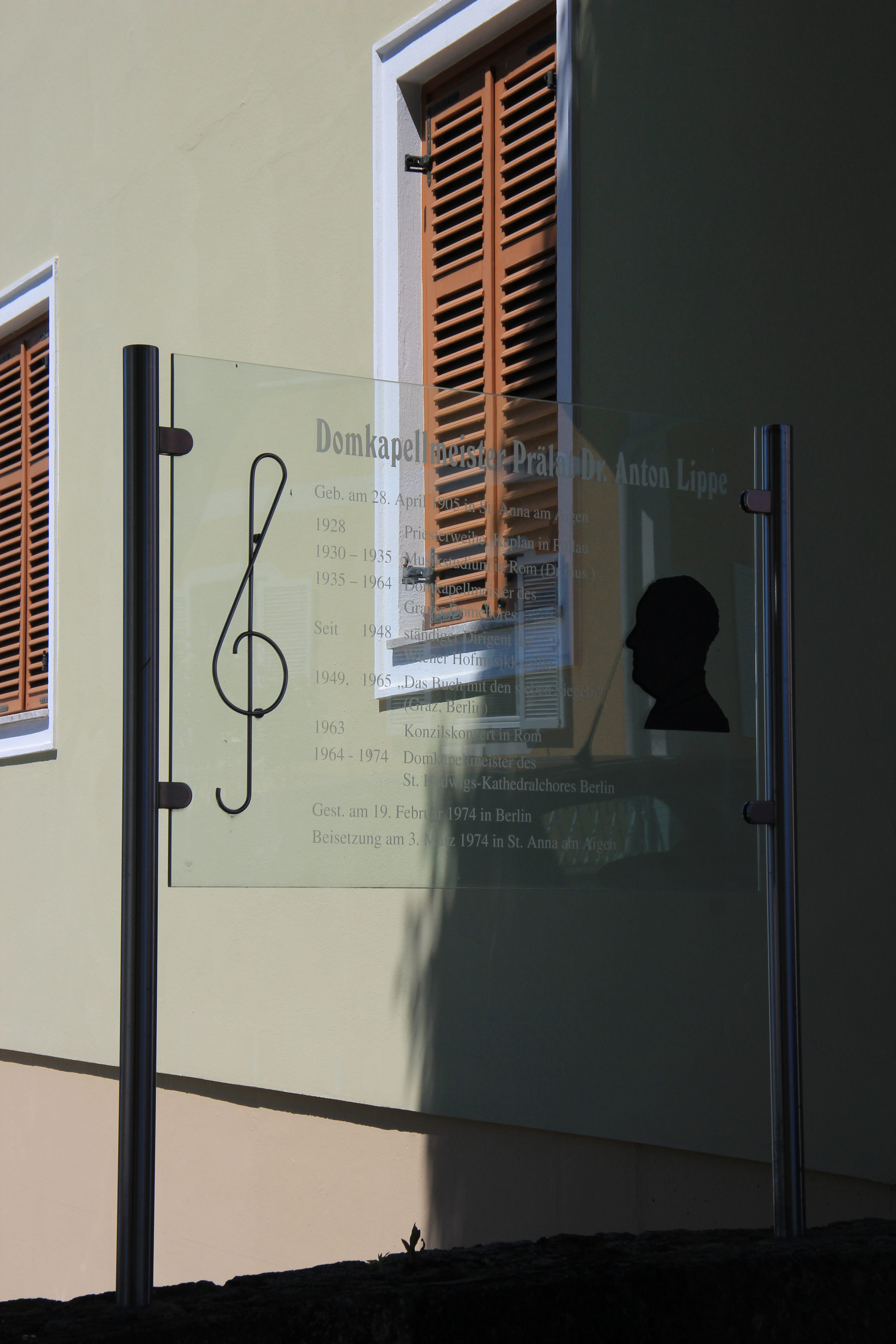 Sankt Anna am Aigen, Südoststeiermark